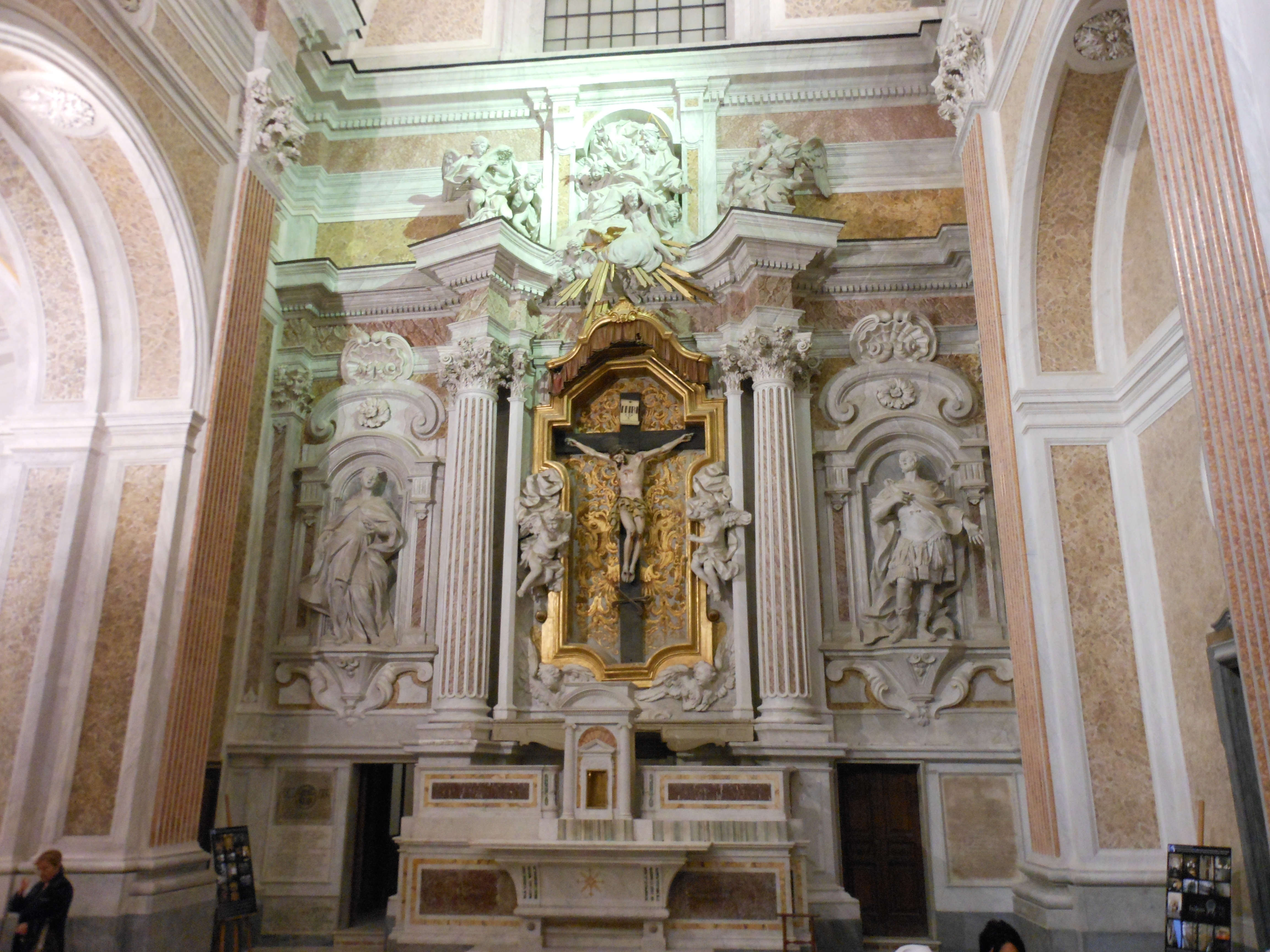 cappellone del Crocifisso, transetto sinistro della chiesa di San Giovanni Maggiore a Napoli